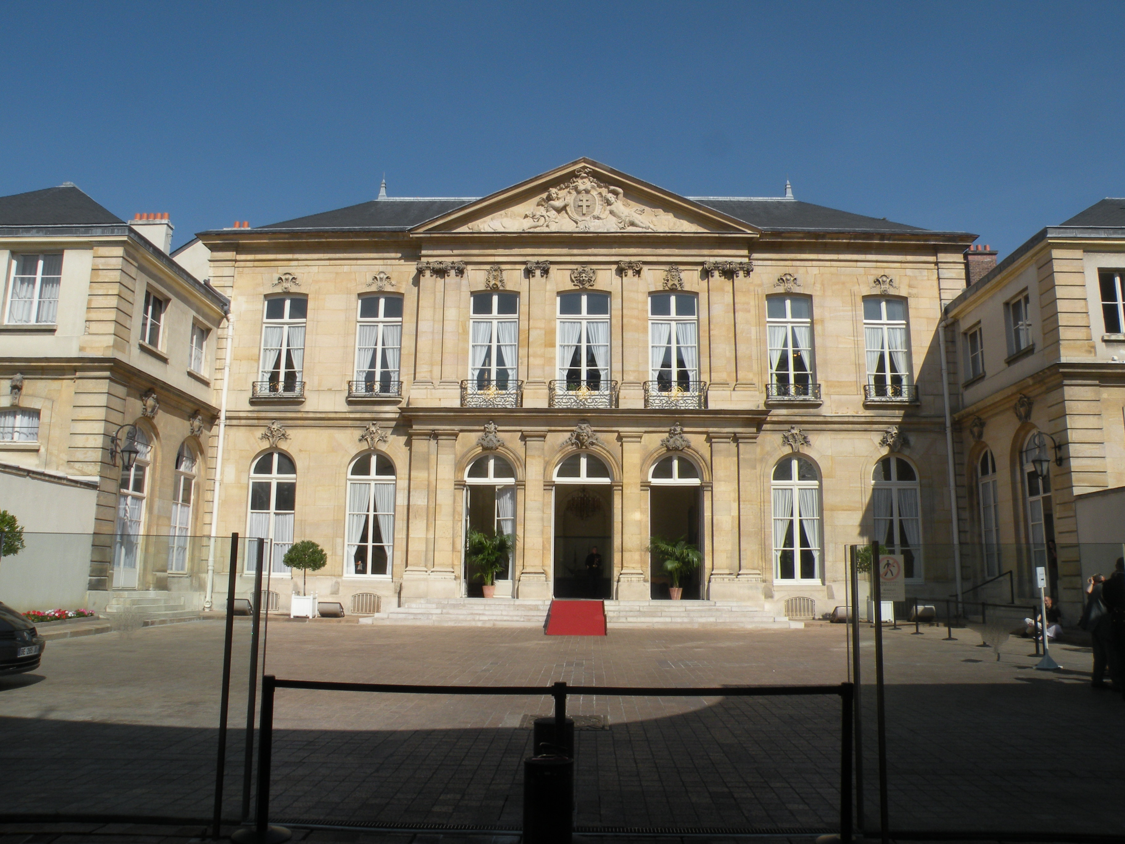 façade de l'Hôtel de Brienne